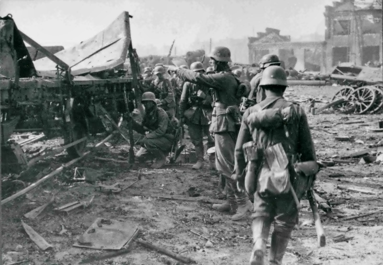 Reparto d'assalto della 305. Infanterie-Division in azione a Stalingrado